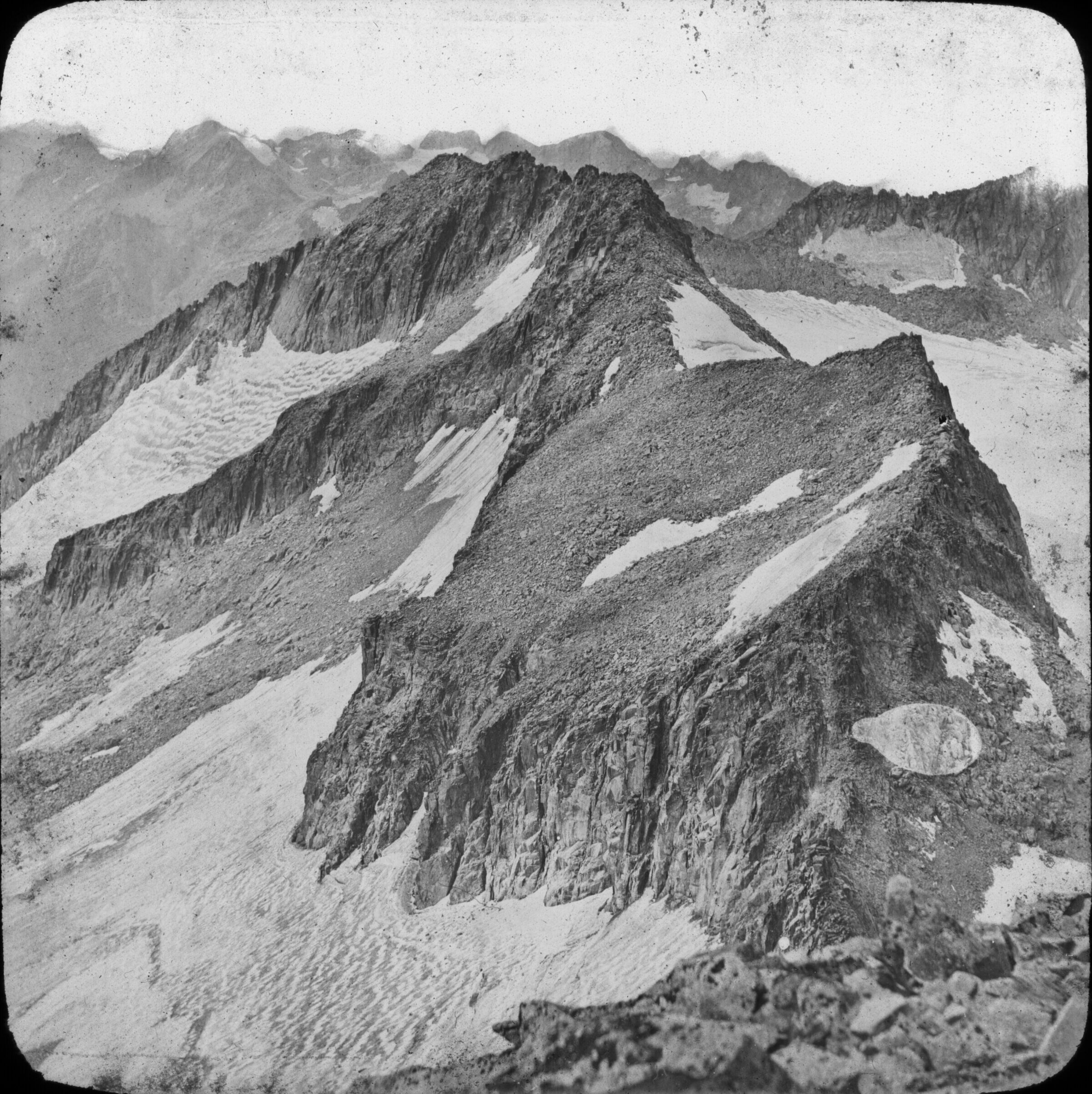 Fonds Trutat - Photographie ancienne Cote : TRU C 246 Localisation : Fonds ancien Original non communicable Titre : Pic du Milieu et pic de la Maladetta, vue prise du sommet du Néthou, août Auteur : Trutat, Eugène Rôle de l’auteur : Photographe Lieu de création : Ribagorza (Huesca ; comarque) Date de création : : 1859-1910 [entre] Mesures : 9 x 10 cm Mot(s)-clé(s) : -- Crête (montagne) -- Pic (montagne) -- Roche -- Neige -- Eté -- Ribagorza (Huesca ; comarque) -- Maladeta, Massif de la (Espagne) -- Montes Malditos (Espagne) -- Maladeta, Pic de la (Espagne) -- Milieu, Pic du (Espagne) -- Esera (Espagne ; haute vallée) -- Aneto (Espagne ; pic) [Vu depuis] -- 19e siècle, 2e moitié -- 20e siècle, 1e quart Médium : Photographies -- Noir et blanc -- Positifs au collodion sur plaque de verre -- Paysages de montagne Voir : TRU C 244 Pics du milieu et de la Maladetta vus du Néthou / Bibliothèque de Toulouse. Domaine public